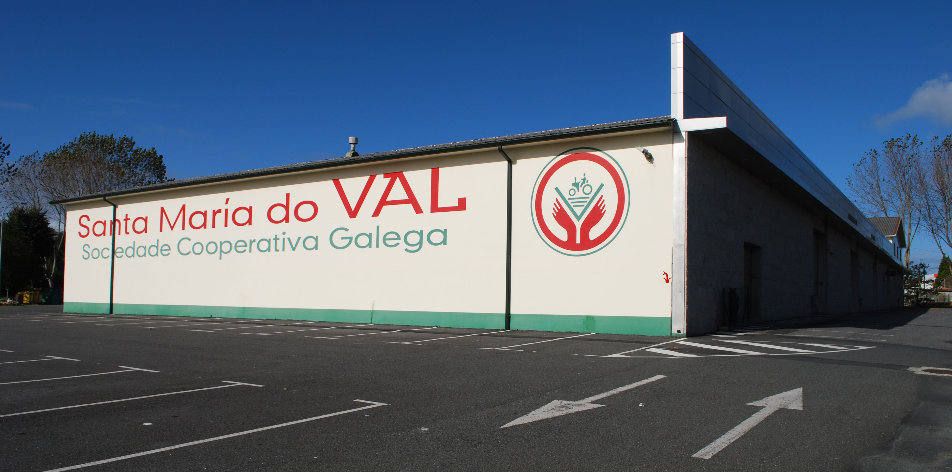 Cooperativa do val Narón A Coruña Galiza